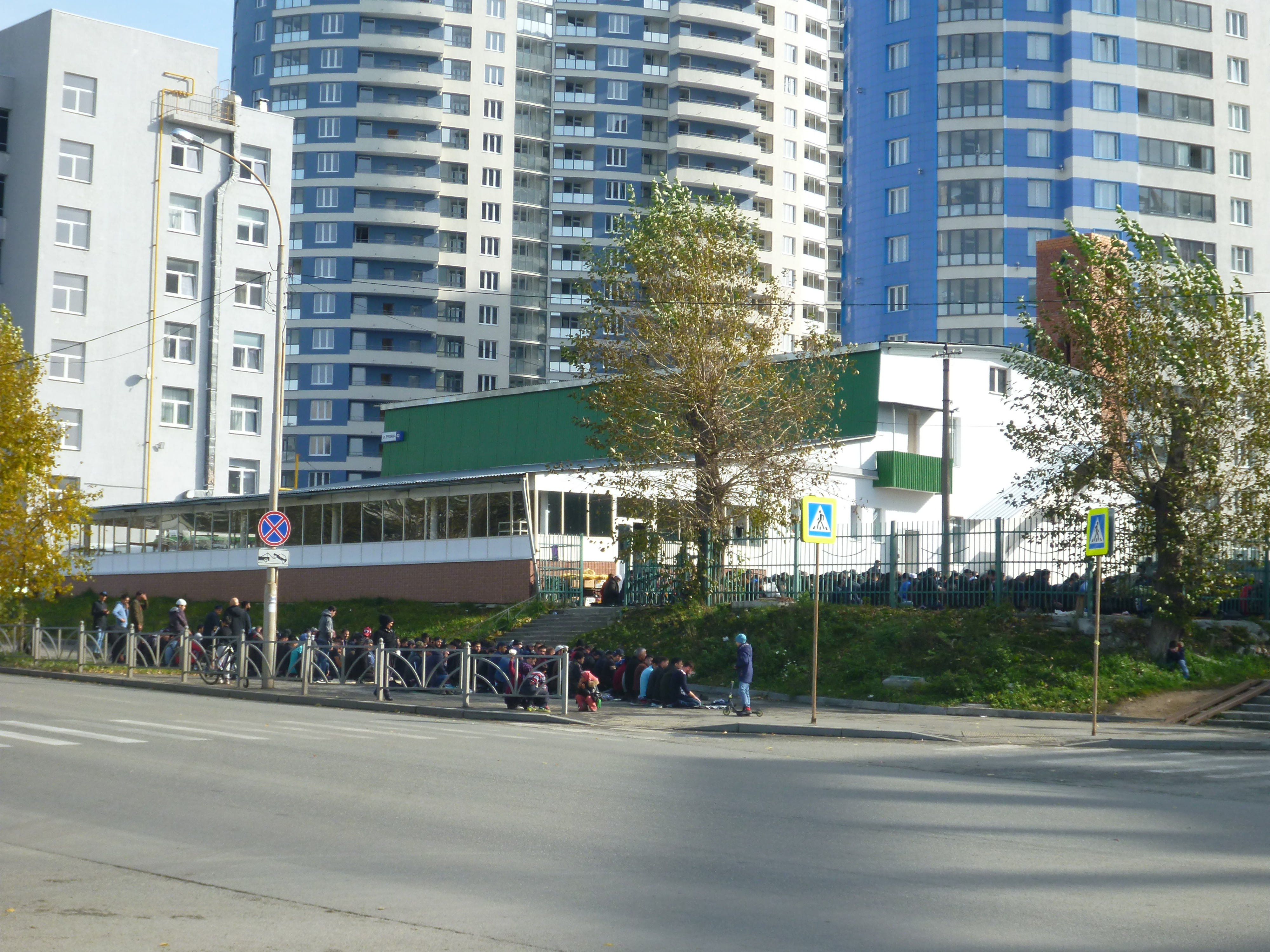 Молящиеся на тротуаре у мечети имени Абу Ханифы Екатеринбург 4 октября 2019 года